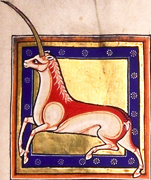 Изображение единорога из Абердинского бестиария